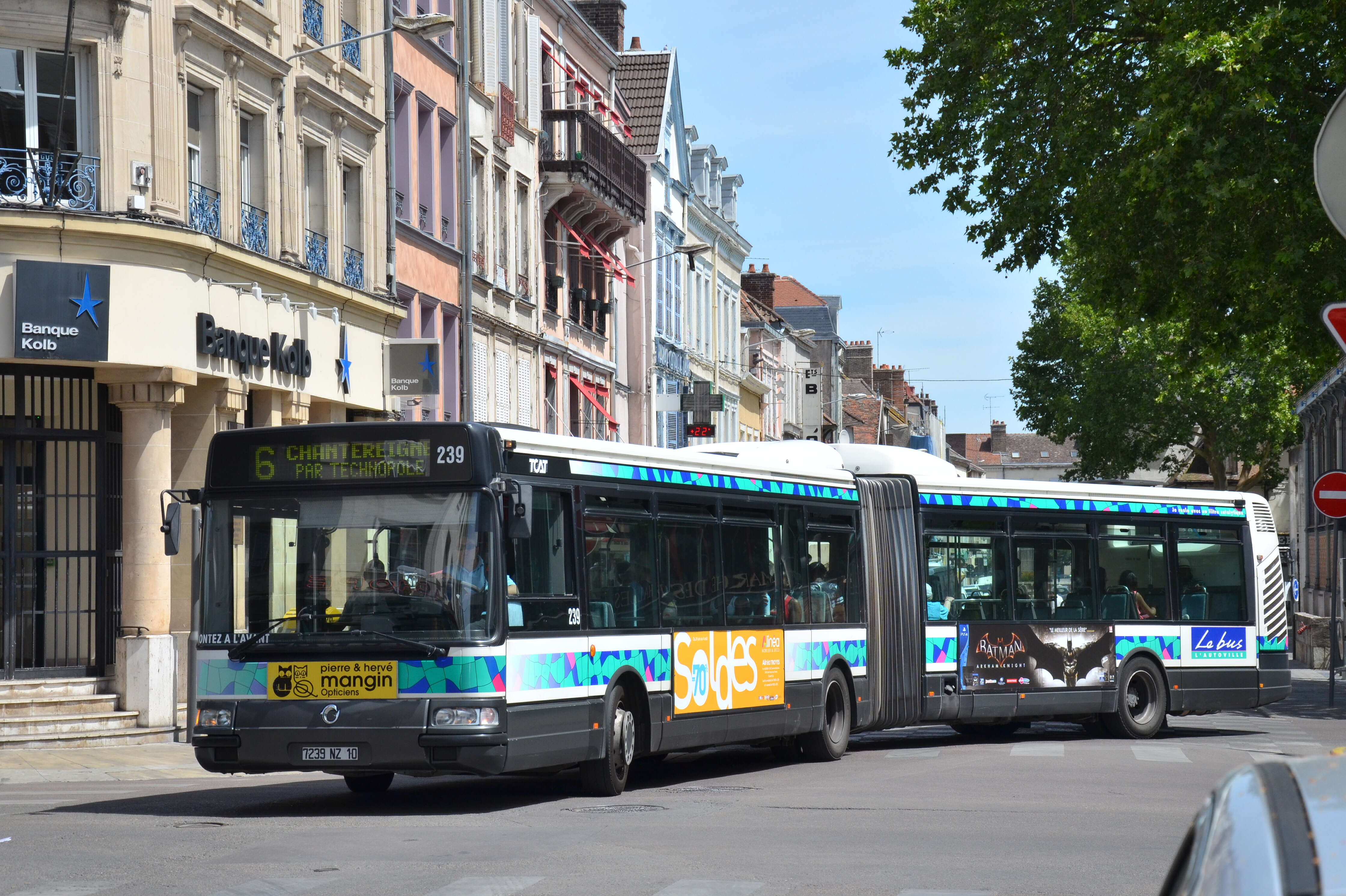 Irisbus Agora L n°239 sur la ligne 6 du réseau TCAT de Troyes, quittant le pôle d'échanges Halle.